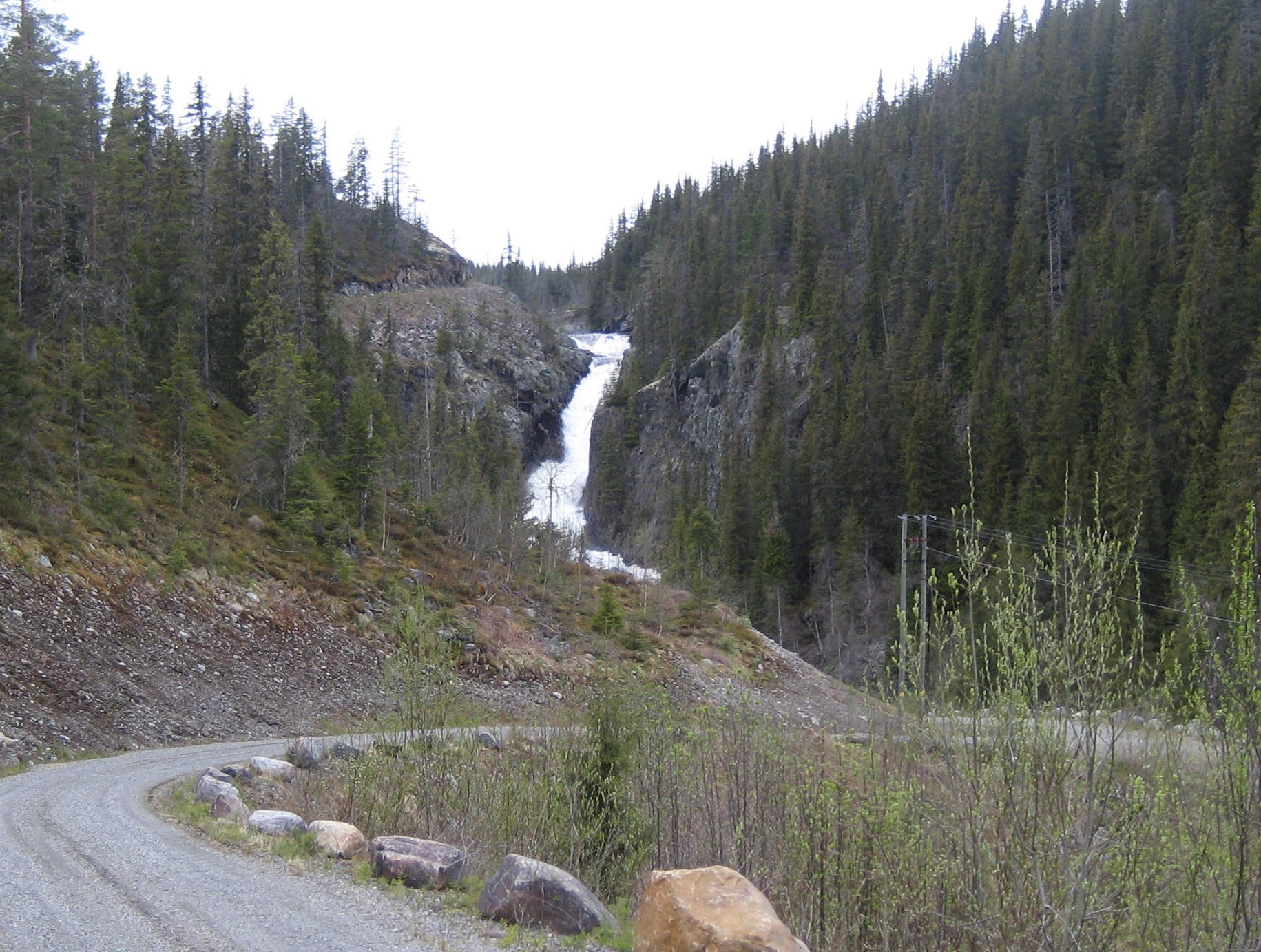 Grytfossen i Livasselva i Torpa